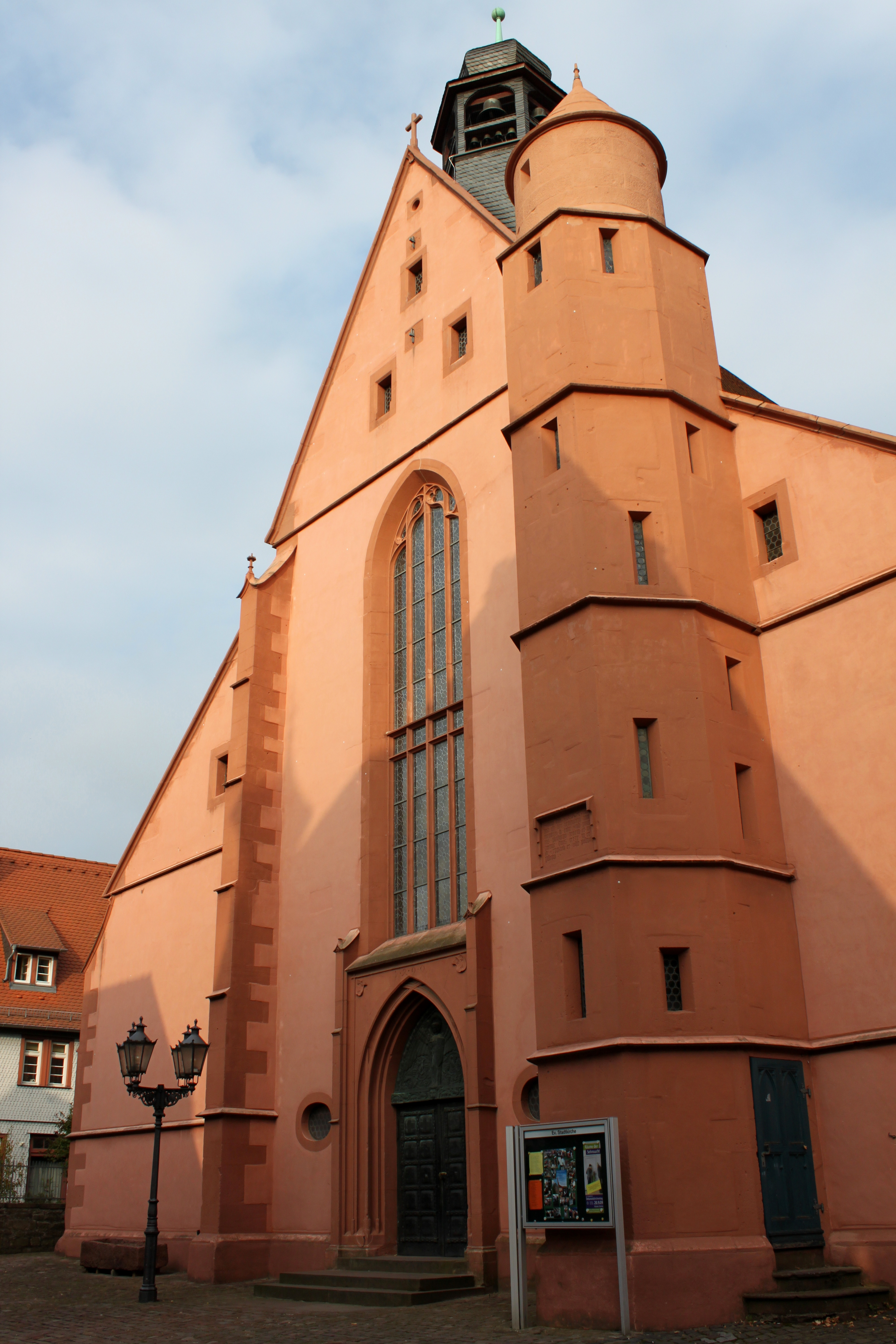 Stadtkirche Michelstadt